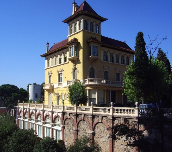 Fotografía del la fachada de la Clínica Creu Blanca en Barcelona. Anteriormente,Casa San Isidre del arquitecto Joaquim Lloret i Homs